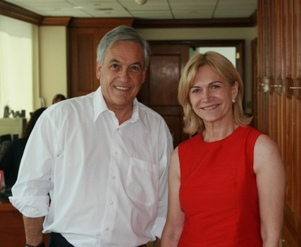 Sebastian Piñera junto a Evelyn Matthei.